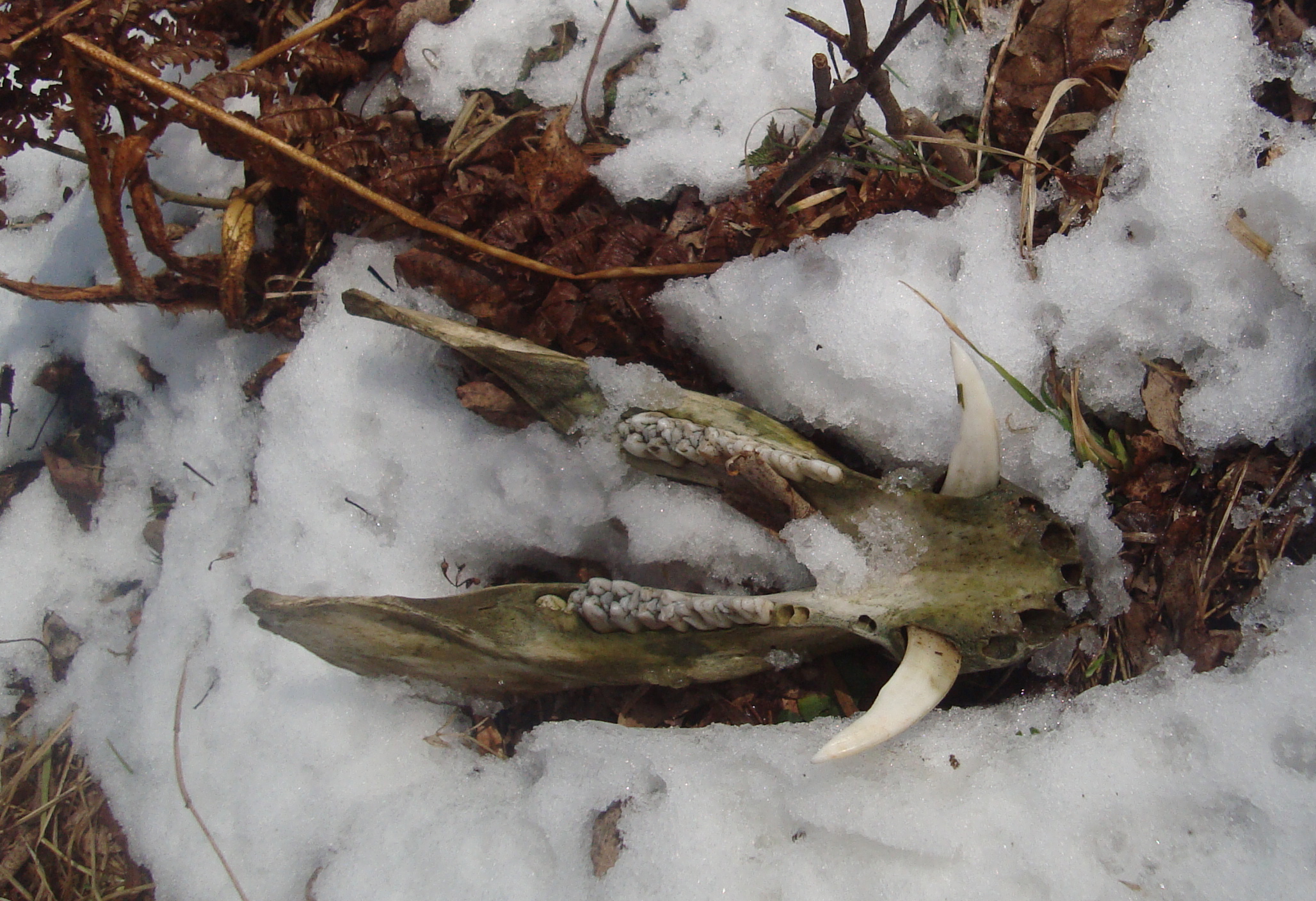 Spodní čelist prasete divokého z Podkomorských lesů, Česká republika, jižní Morava